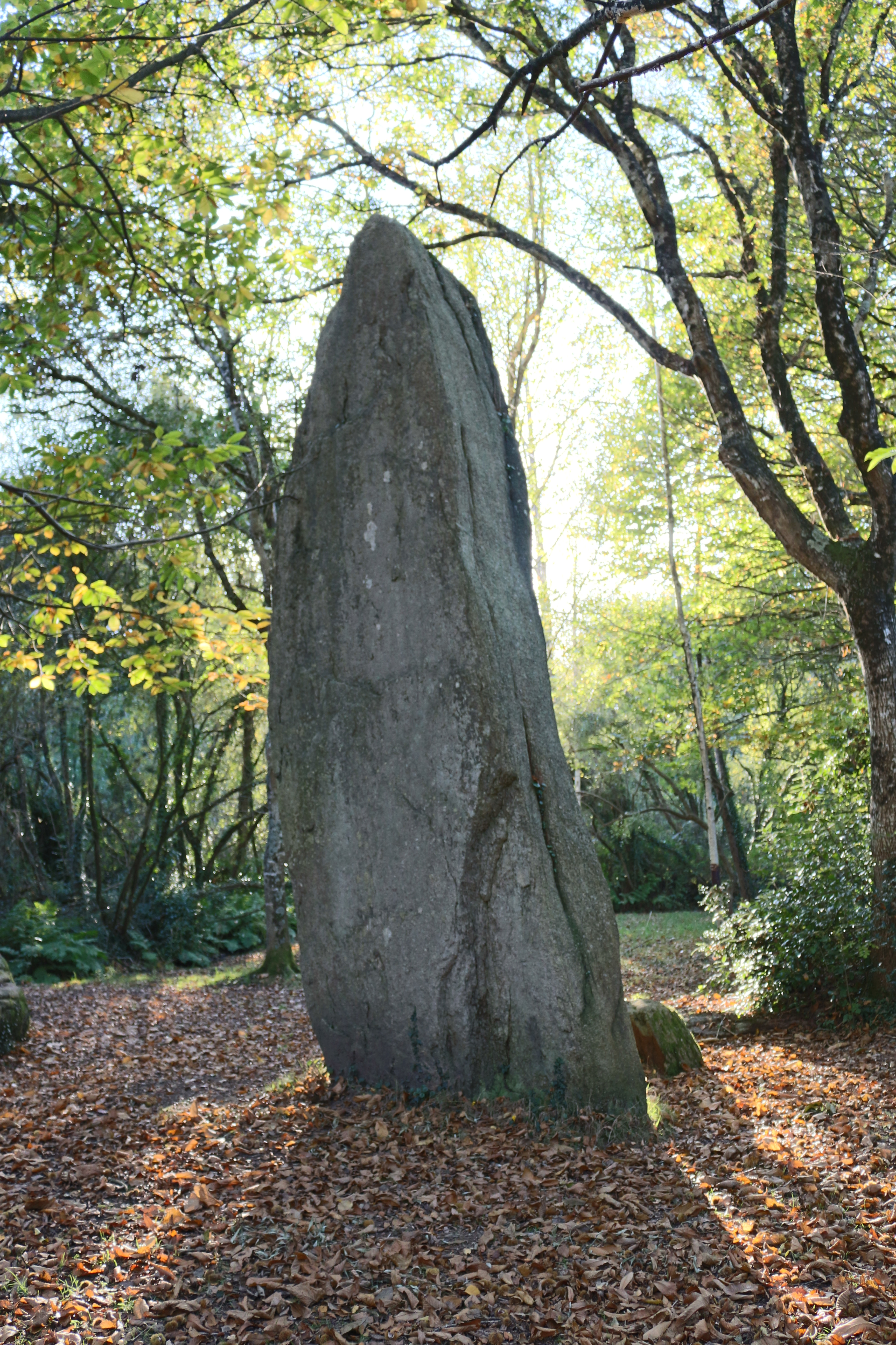 Le grand menhir de Lespurit-Ellen, commune de Plovan, Finistère, Bretagne, France.